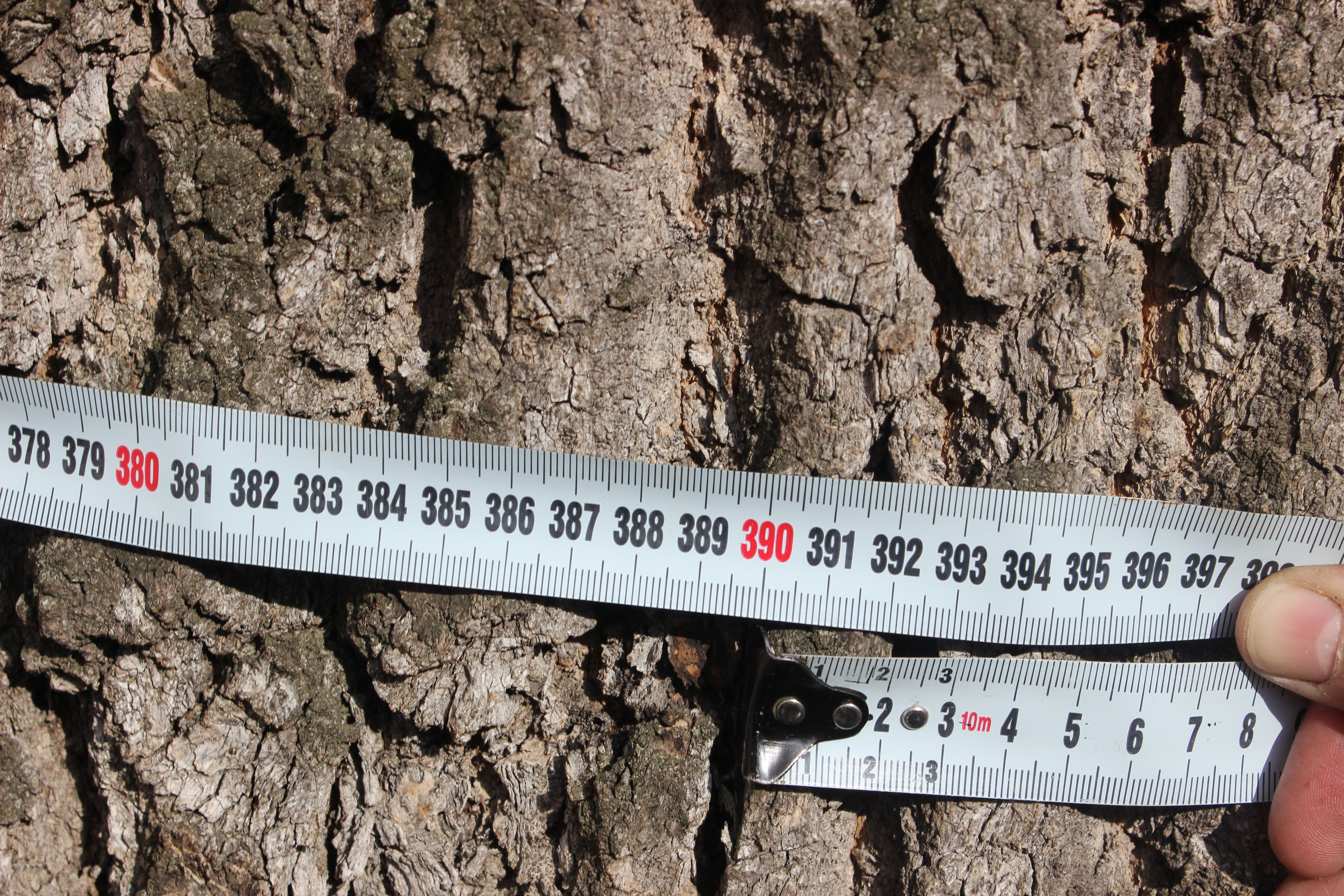 Вікове дерево ясена, Печерський район вул. Івана Мазепи (кол. Січневого повcтання),29